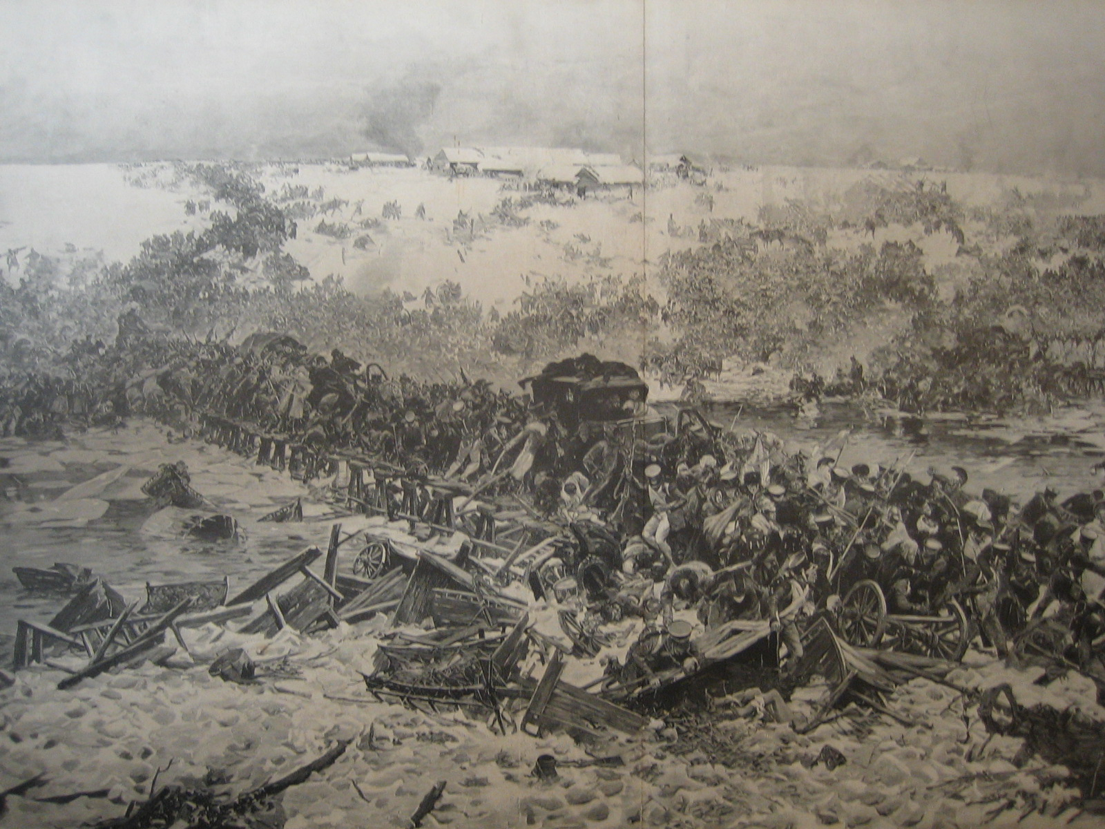 Stahlstich, Übergang der französischen Armee über die Bresina 1813, private Kunstsammlung